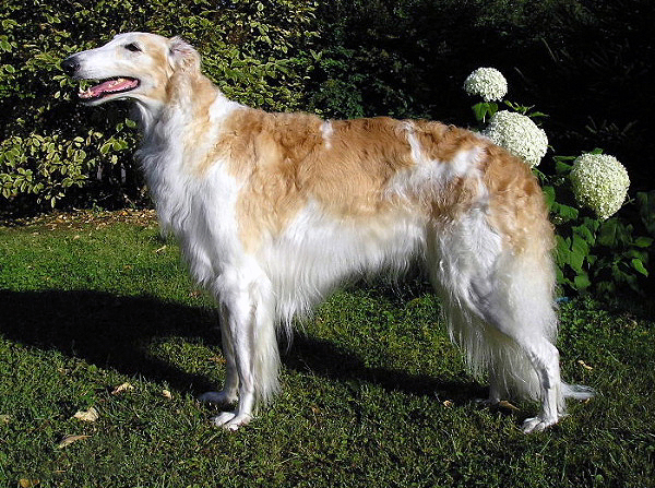 Borzoi female